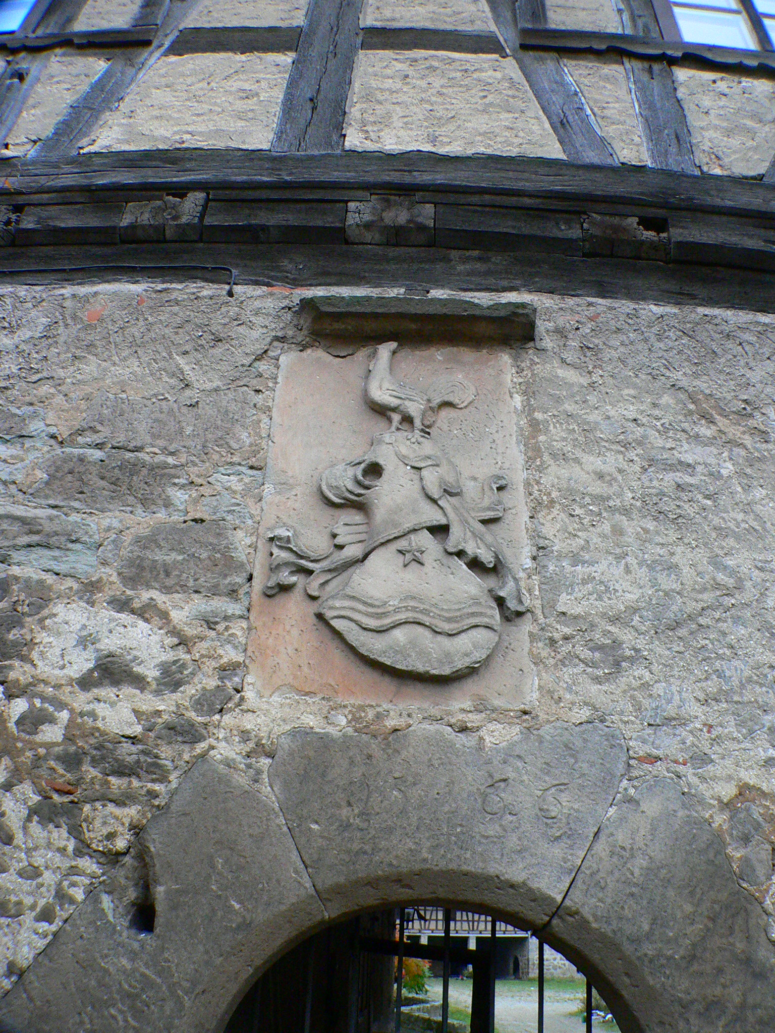 Schloss Ebelsbach, Wappenstein